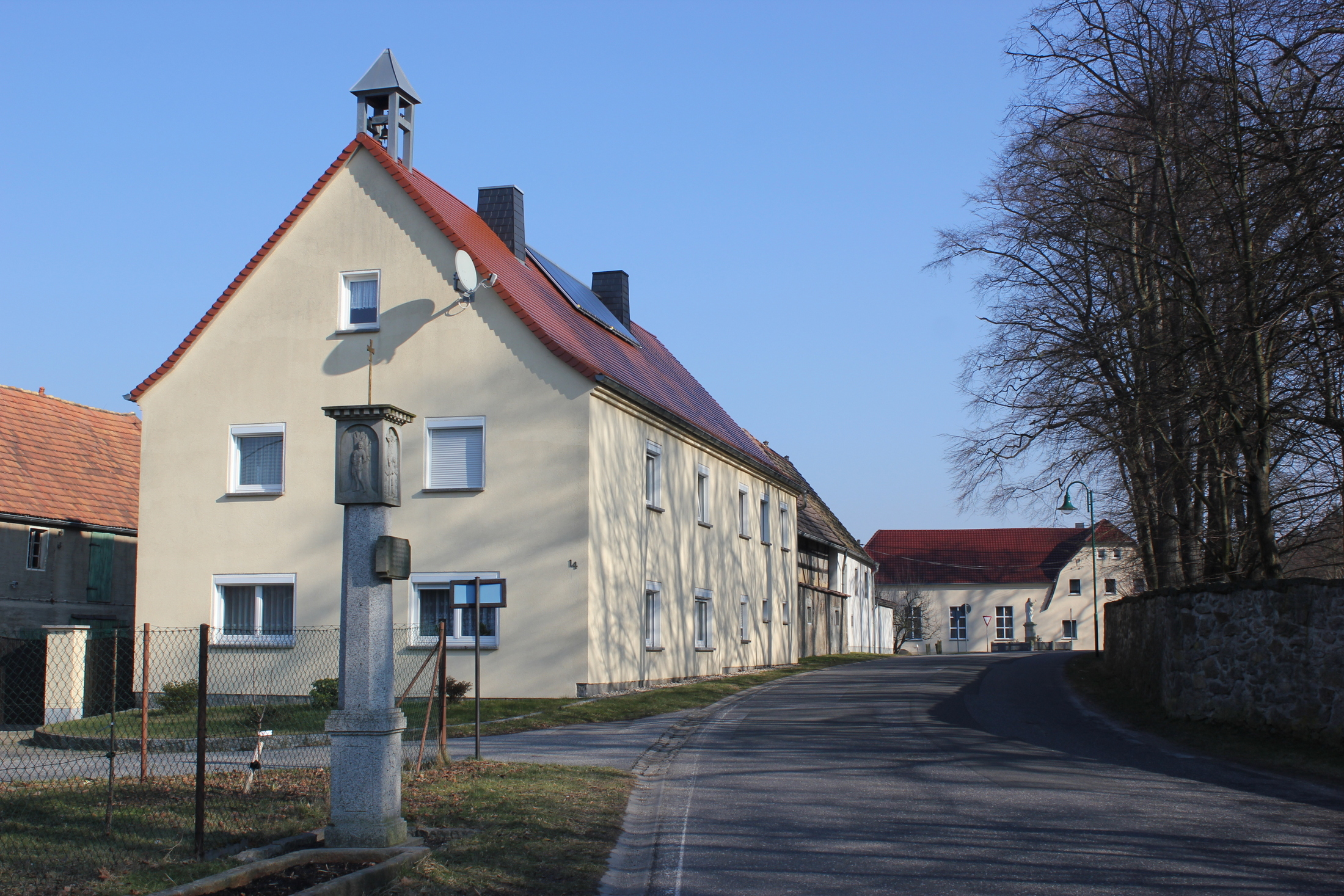 Hornjoserbsce: Pěskecy; Kamjenska dróha z modlerskim stołpom.